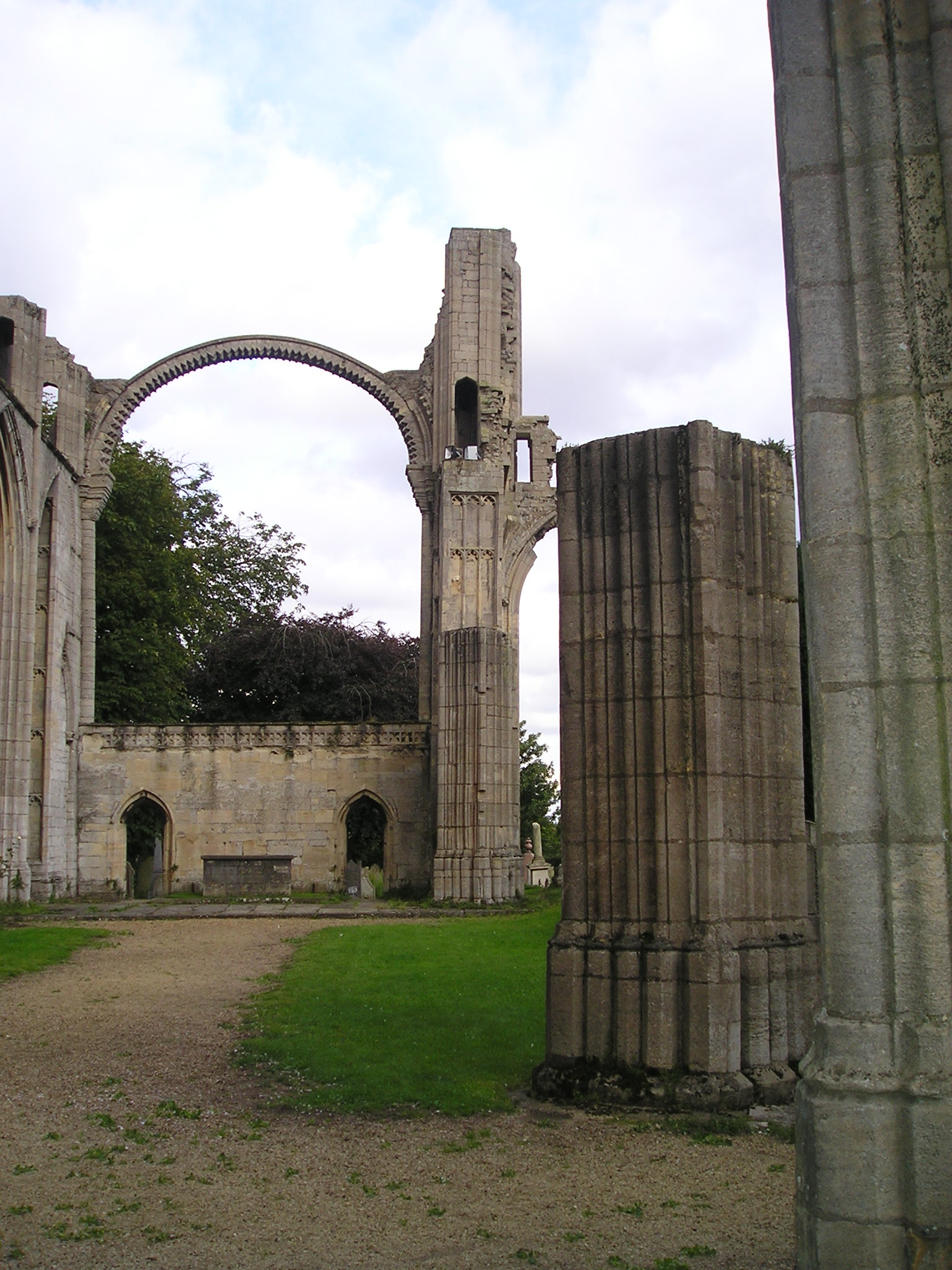 Crowland,_Croyland-Abbey,_Blick_zum_Chorbogen_des_ehemaligen_Mittelschiffes